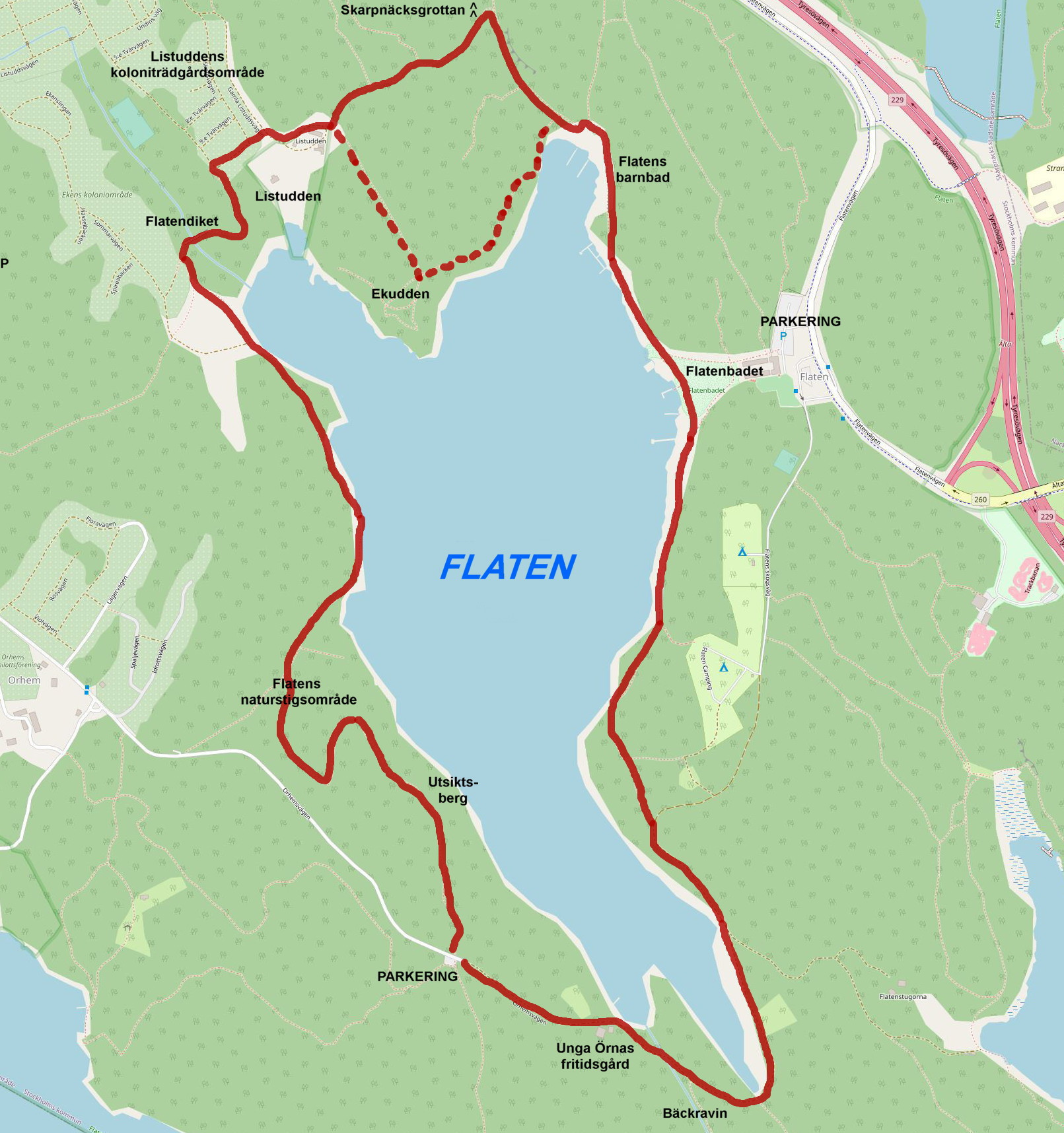 Sjön Flaten med vandringsleden "Flaten runt". Bakgrundskarta: Open Street Map Förklaringar: Holger Ellgaard